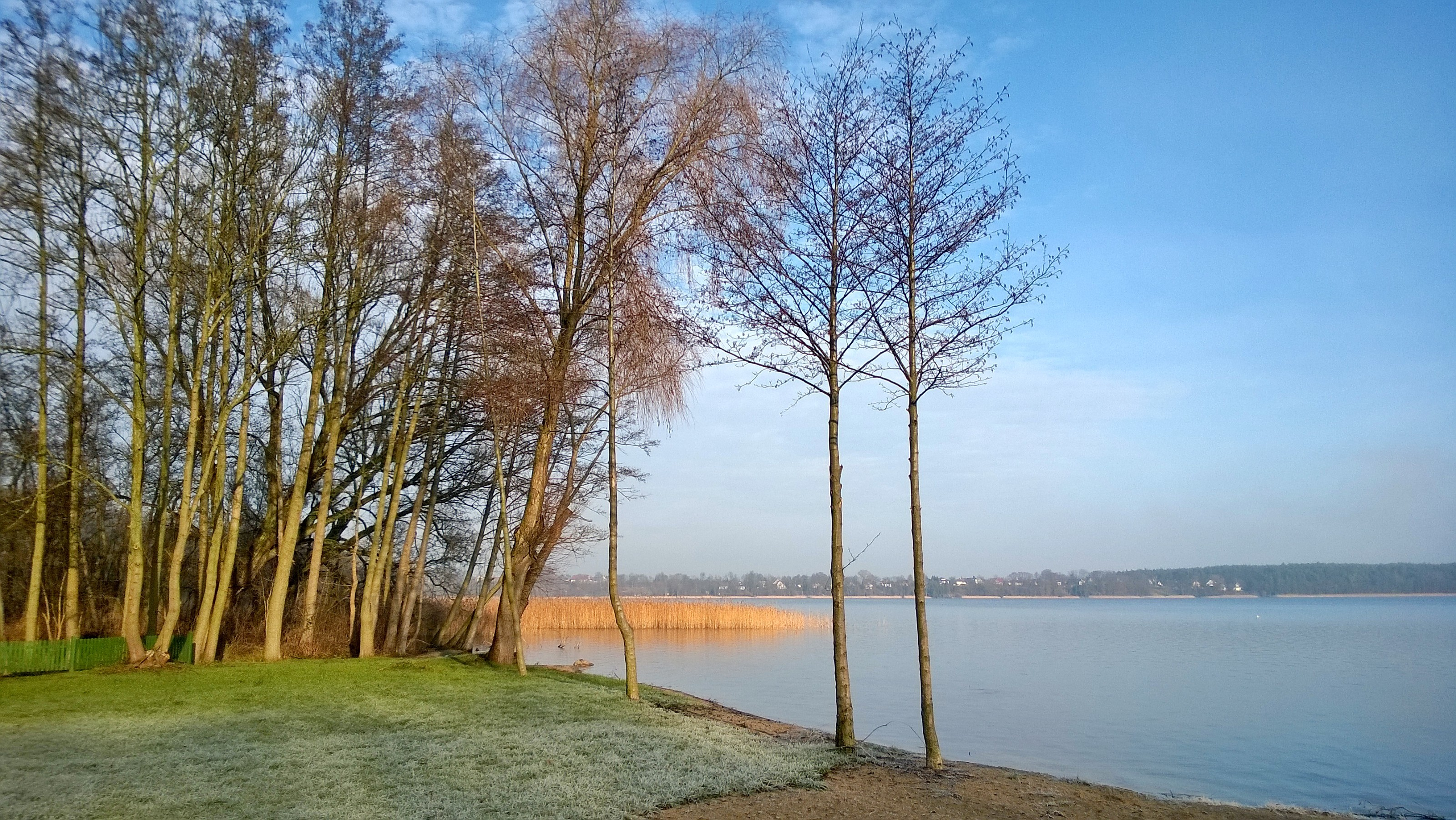 Jezioro Morzycko